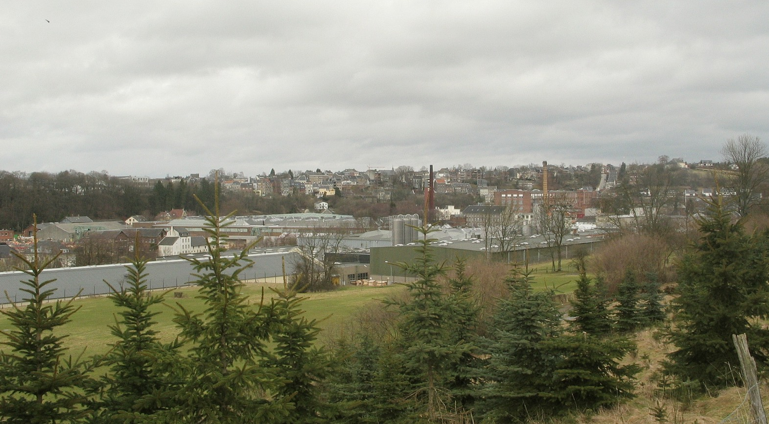 Blick auf das Gebäude der ehemaligen Spinnerei „Kammgarnwerke“. Heute Bestandteil des Gebäudekomplexes der Kabelwerk Eupen AG